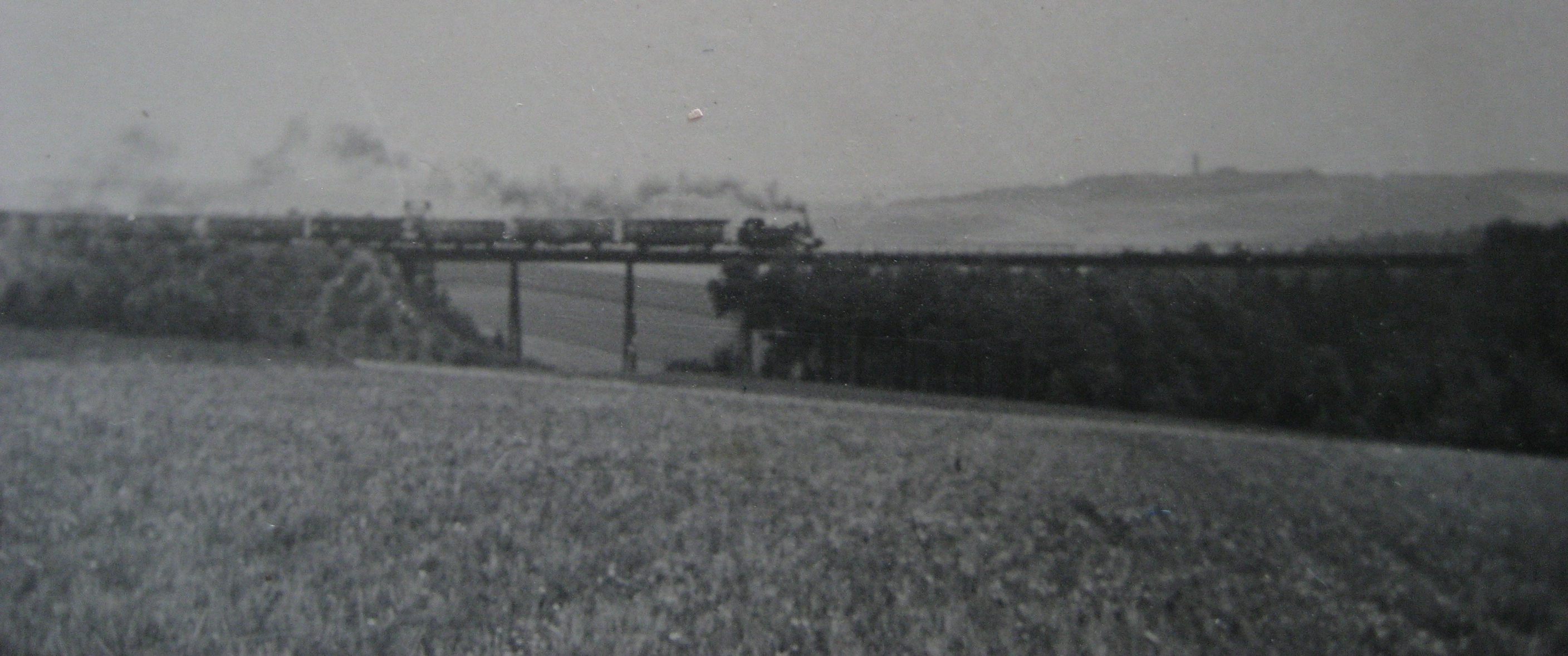 Der Auritztalviadukt. Im Hintergrund der Bismarckturm Chemnitz-Borna.